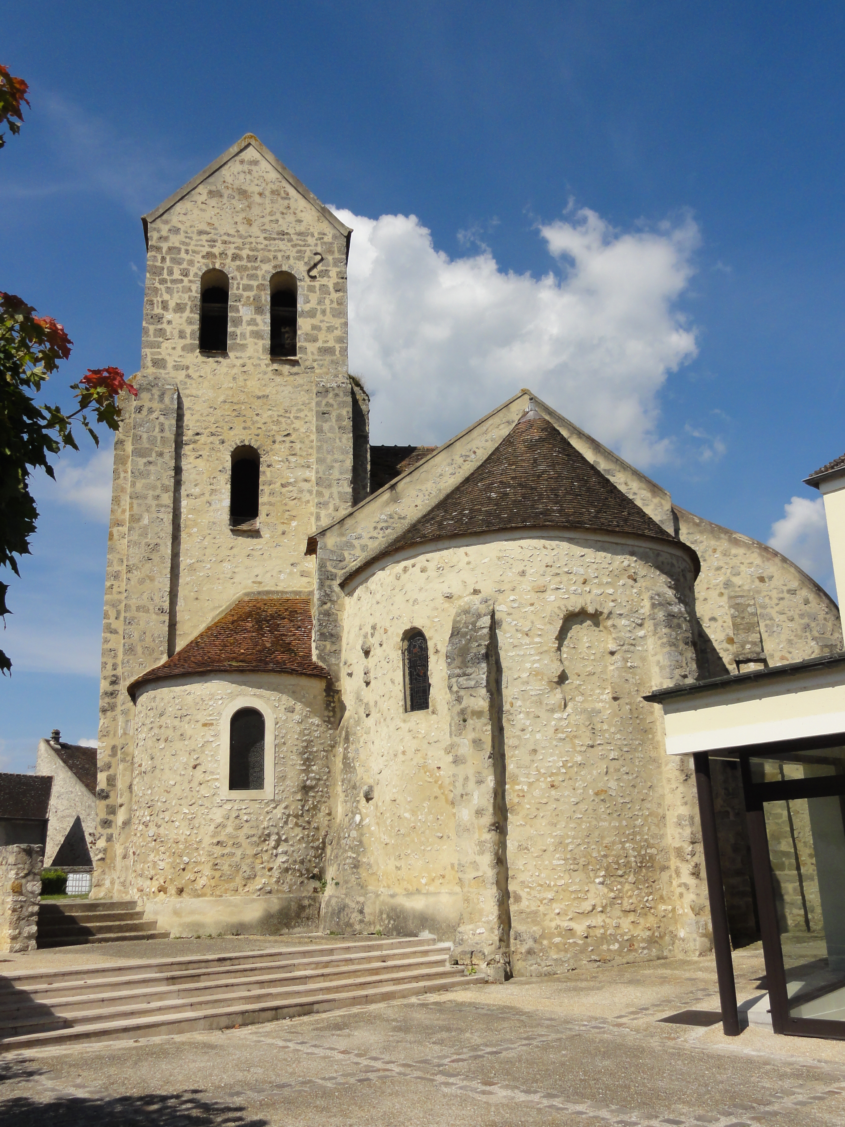 Chevet.